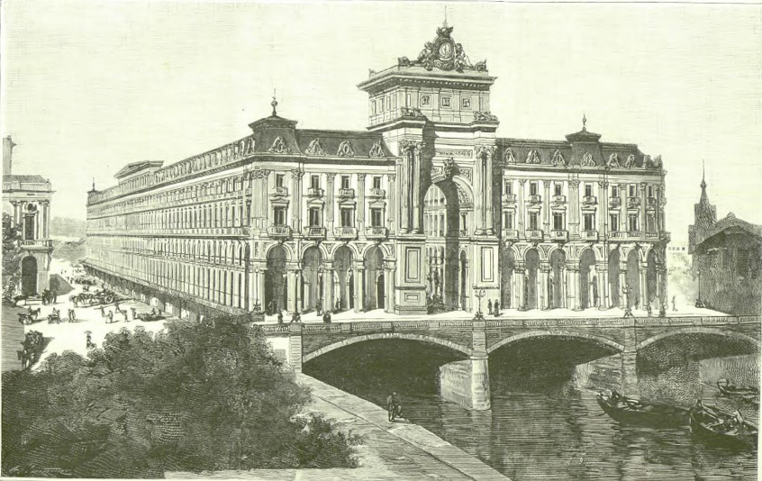 Alberto Palaciosek Bilboko Areatzarako egindako zubi proposamena